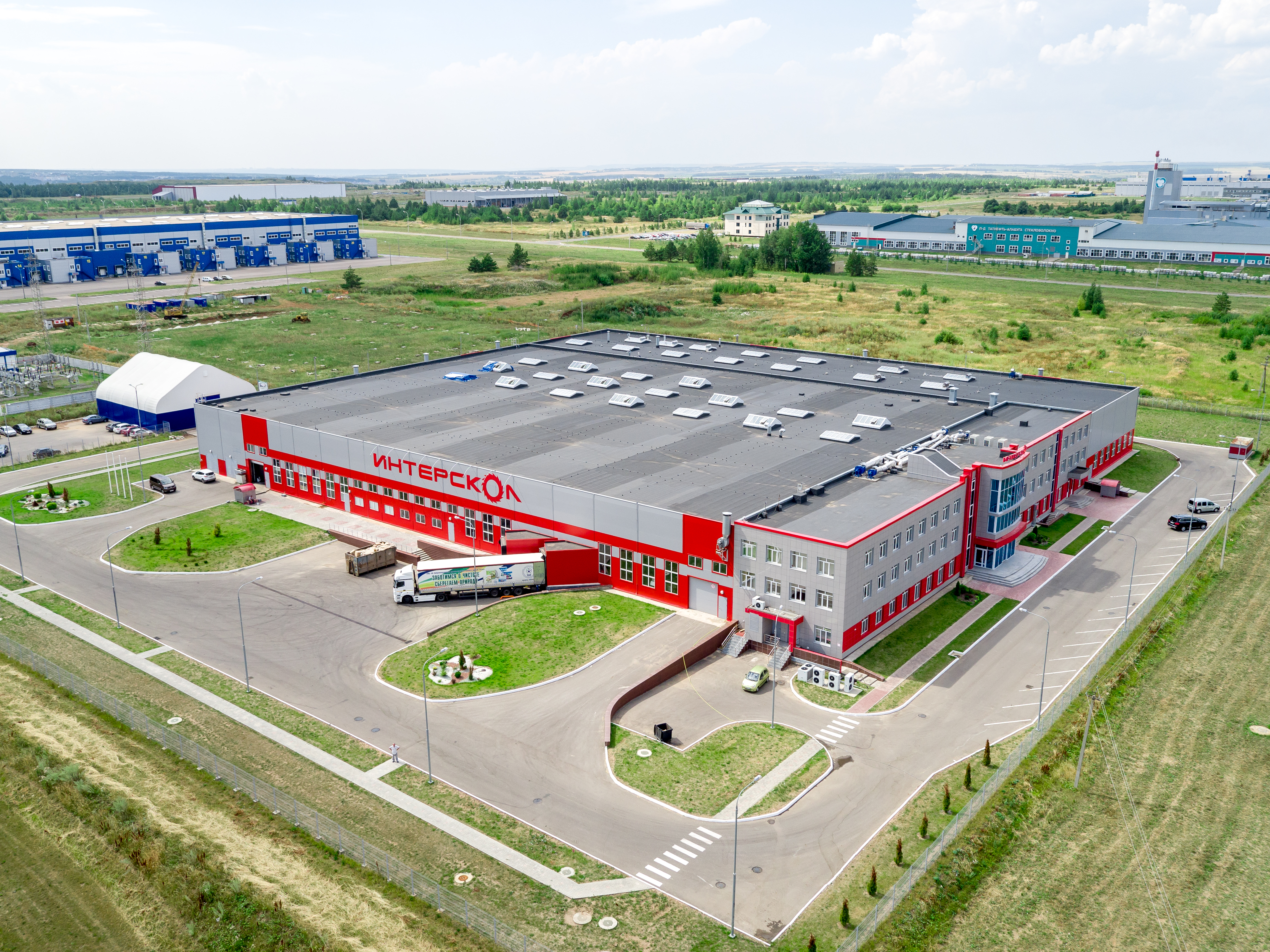 Особая экономическая зона «Алабуга», Завод «Интерскол-Алабуга»